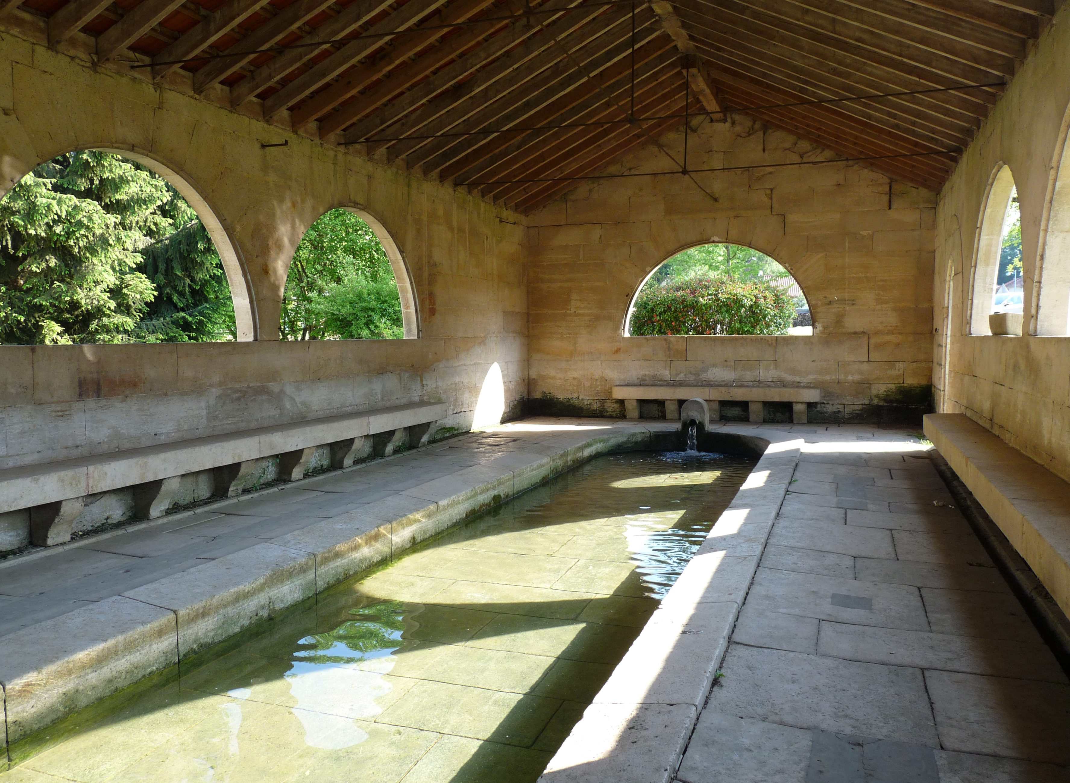 Lavoir d'Haironville (Meuse).